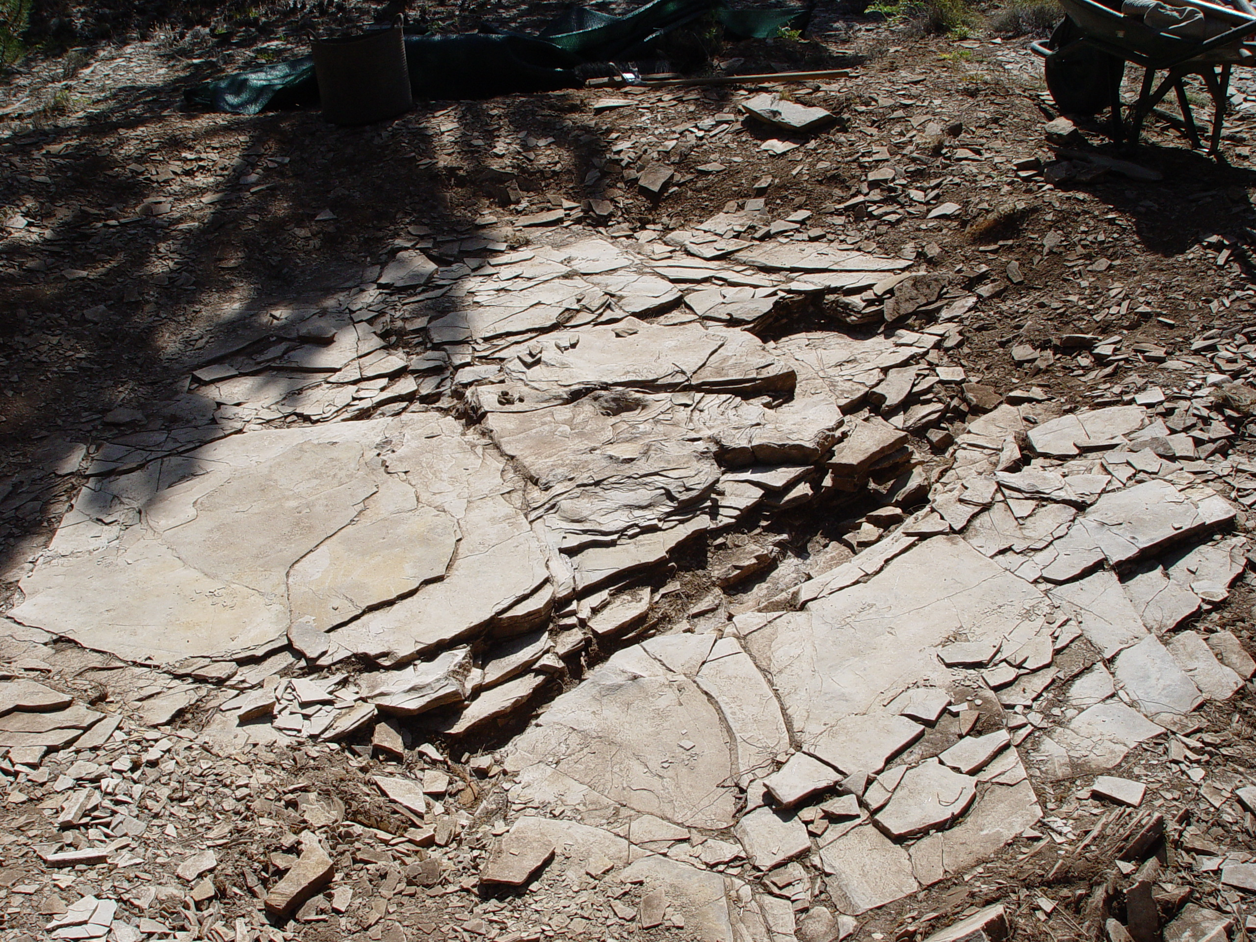 Los restos de Concavenator en el yacimiento del Cretácico Inferior (125 millones de años) de Las Hoyas (Cuenca) antes de procederse a su extracción. The digsite before excavation.